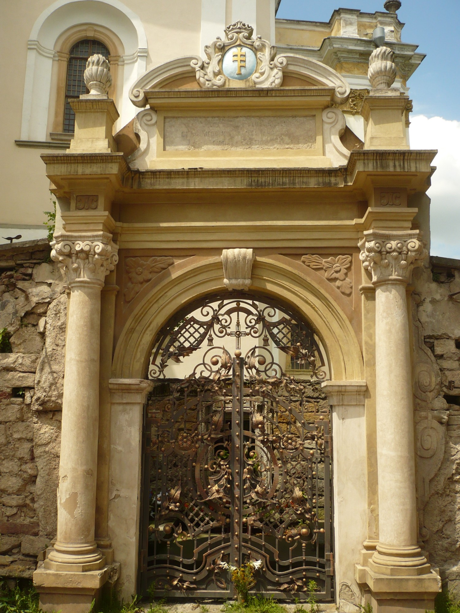 Buczacz. Kościół NMP